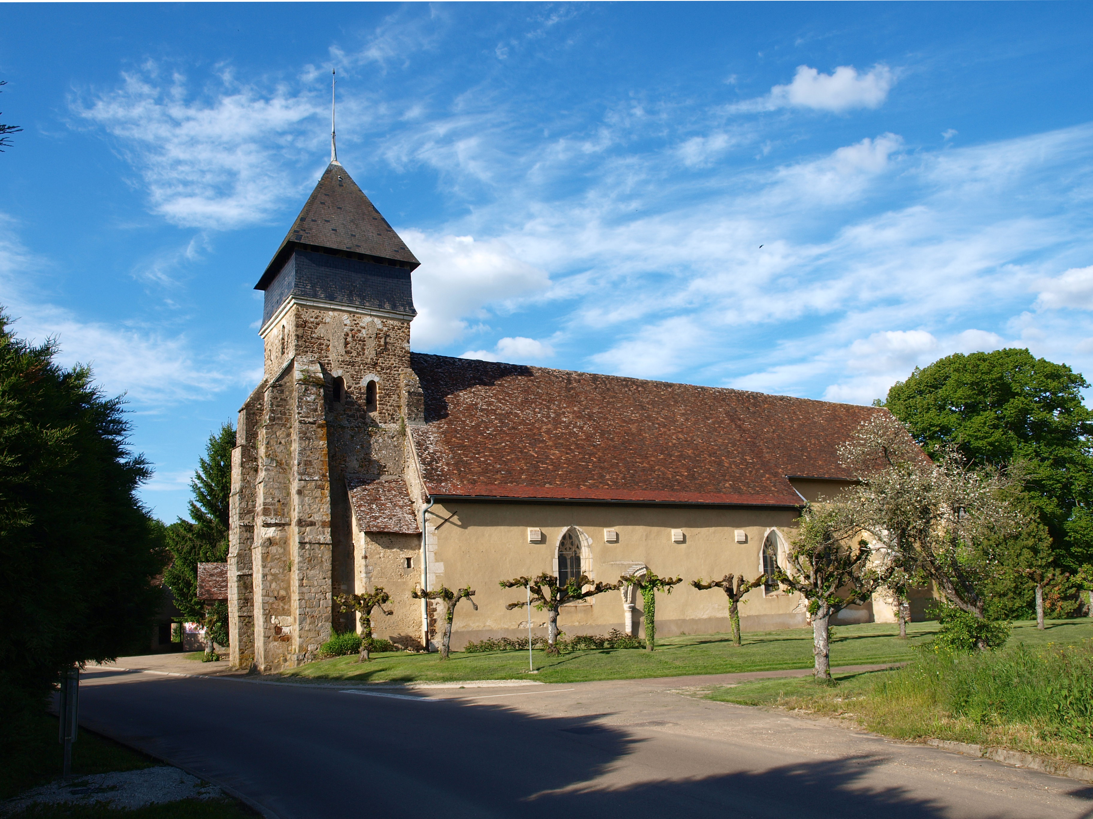 Dracy-sur-Ouanne (Yonne, France)